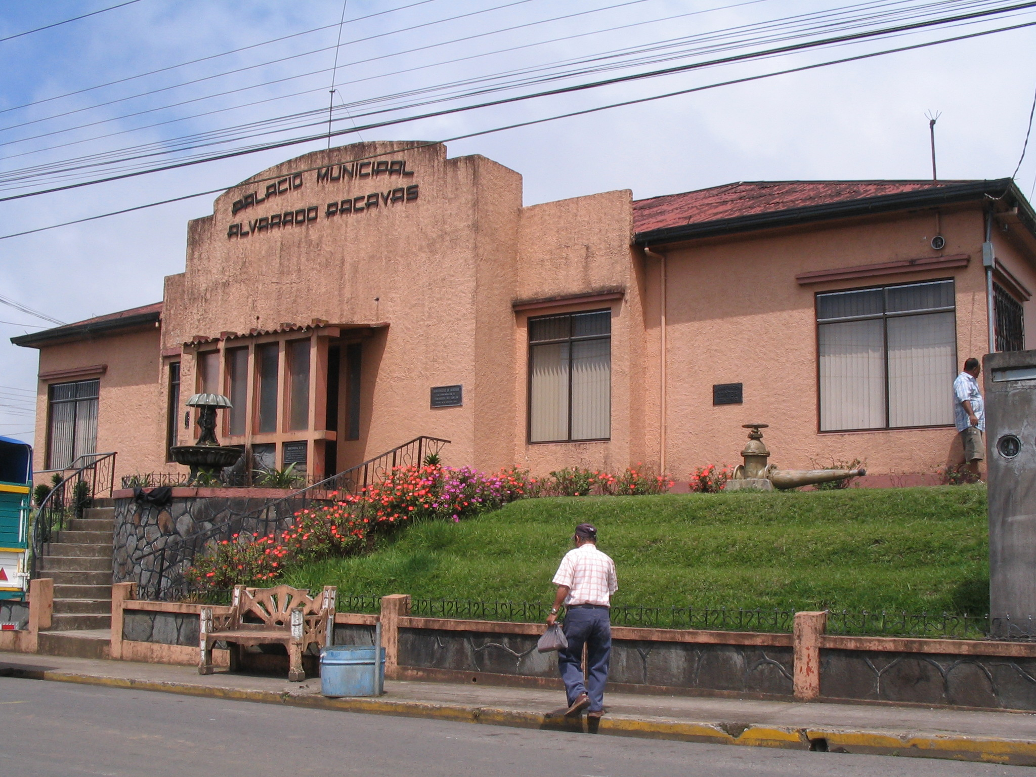 Foto de la Municipalidad del Canton de Alvarado